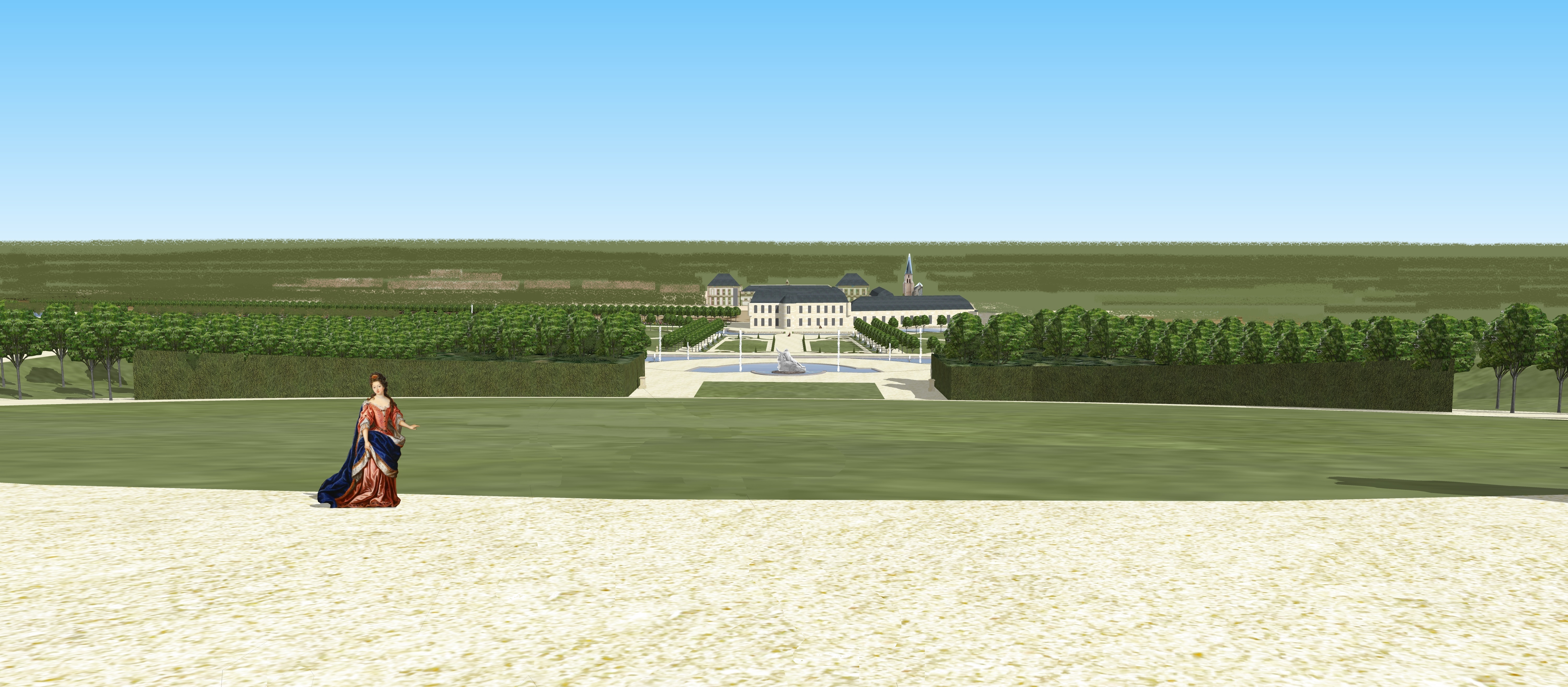 Schéma de la grande perspective du château de brunoy au XVIIIe siècle